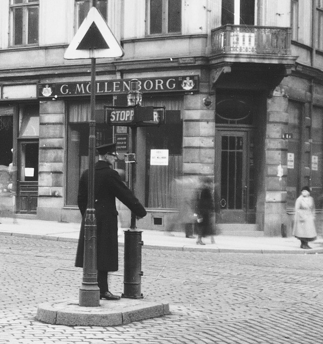 Sturegatan 10, polisman reglerar trafiken med AGA:s "Stopp-Kör" - signal